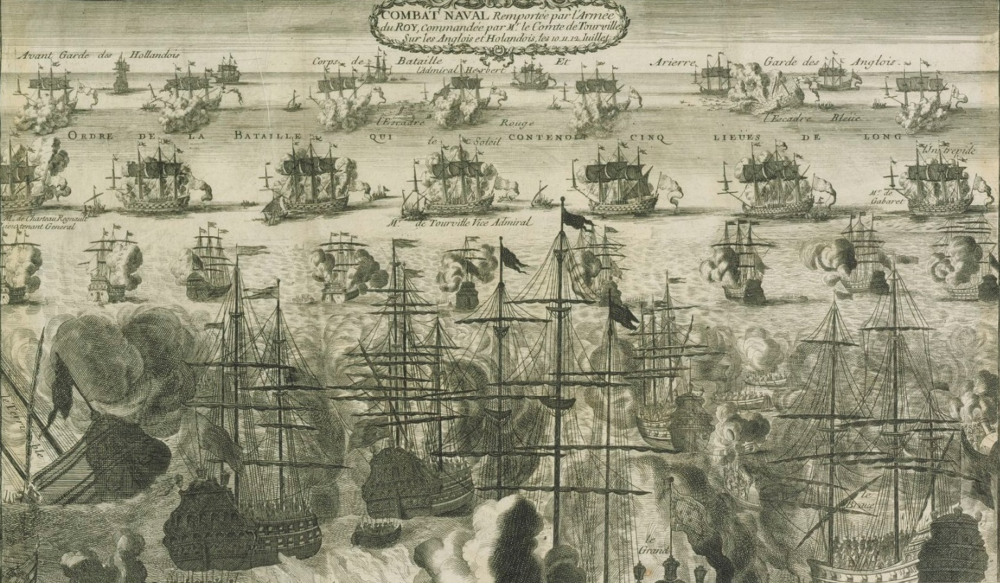 Gravure de 1691 mettant en scène la bataille navale de Béveziers le 10 juillet 1690 dans la Manche. Détail d'un almanach d'époque.